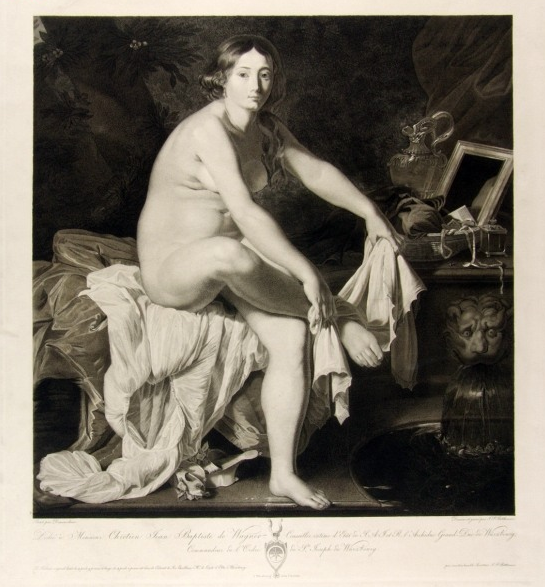 Badende (Susanna) nach dem Gemälde von Domenichino (Domenico Zampieri) um 1800. 53,5×48 cm